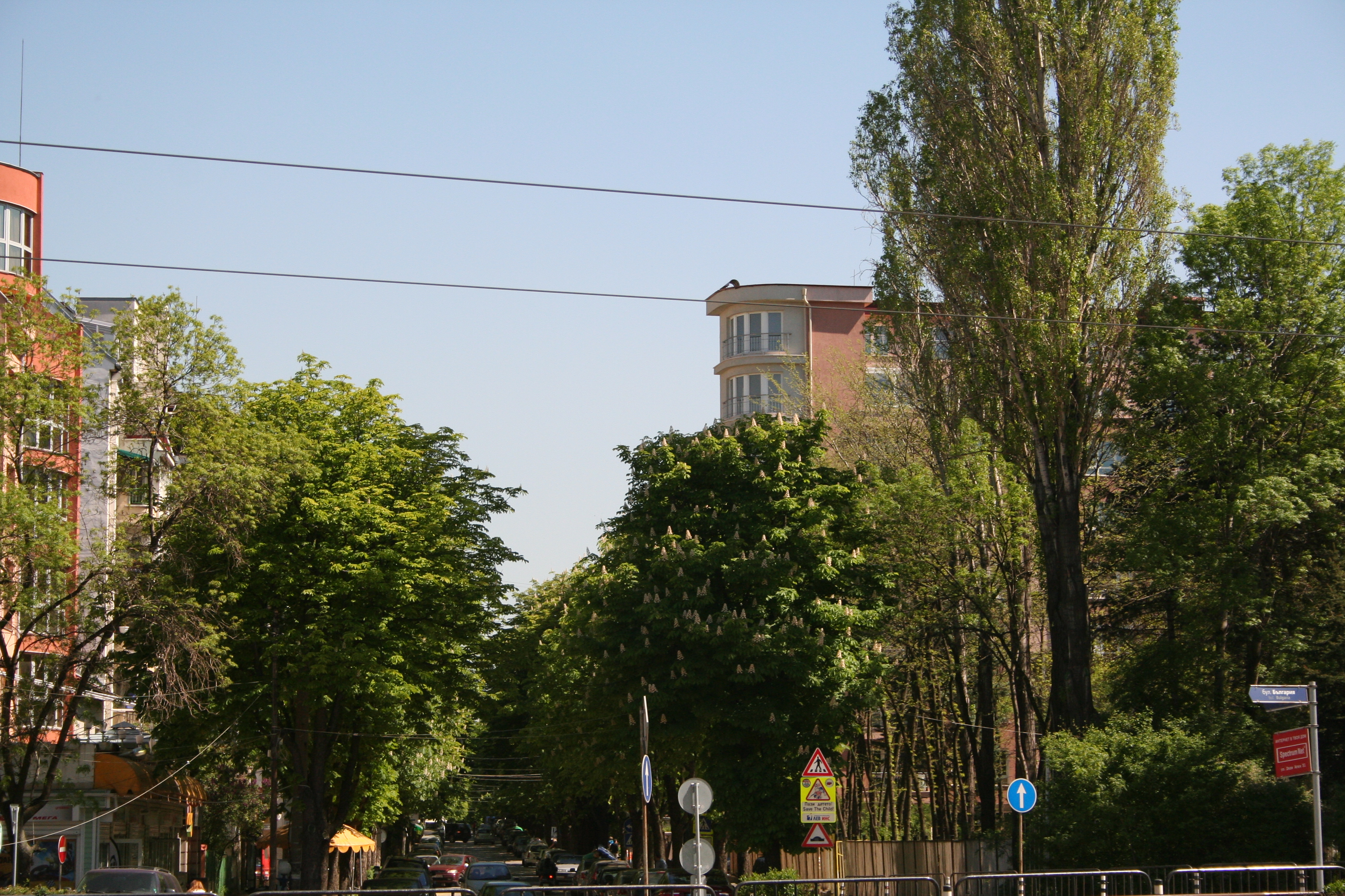 ул. „Нишава“ с бул. „България“ (крайна част на ж.к. „Стрелбище“), в близост до 126 ОУ „П. Ю. Тодоров“